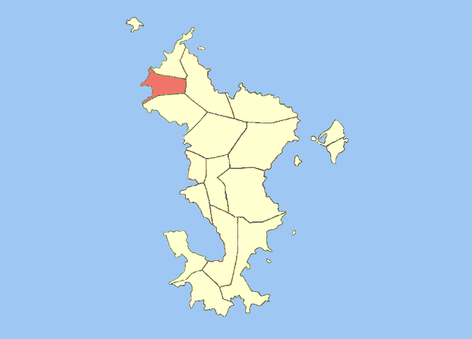 Emplacement de la ville de Acoua sur l'île de Mayotte